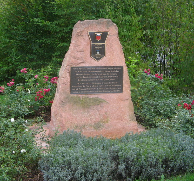 Gedenkstein an die Besatzung Schmöllns durch amer. Streitkräfte am 13. April 1945